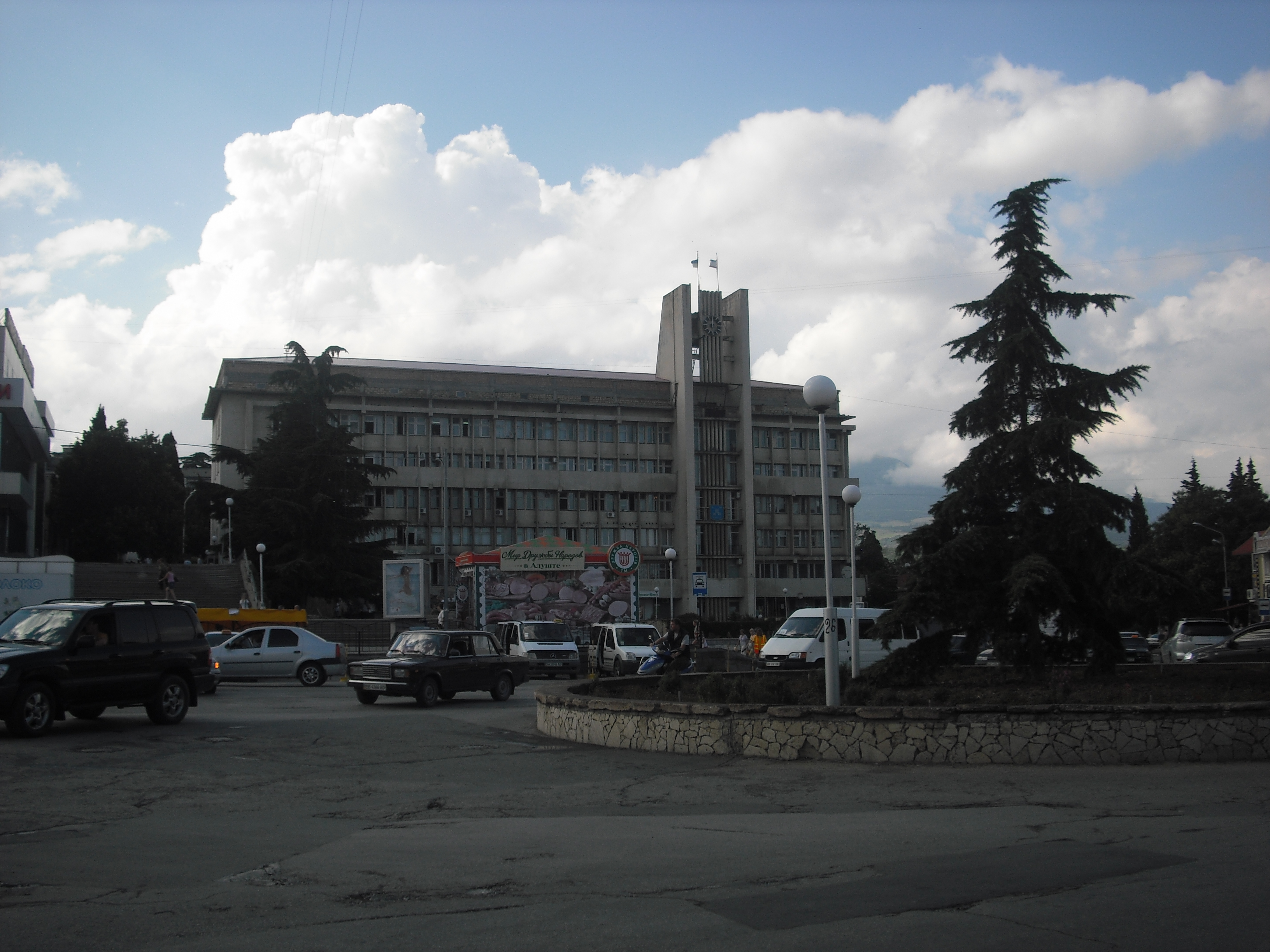 Здание Алуштинского горсовета